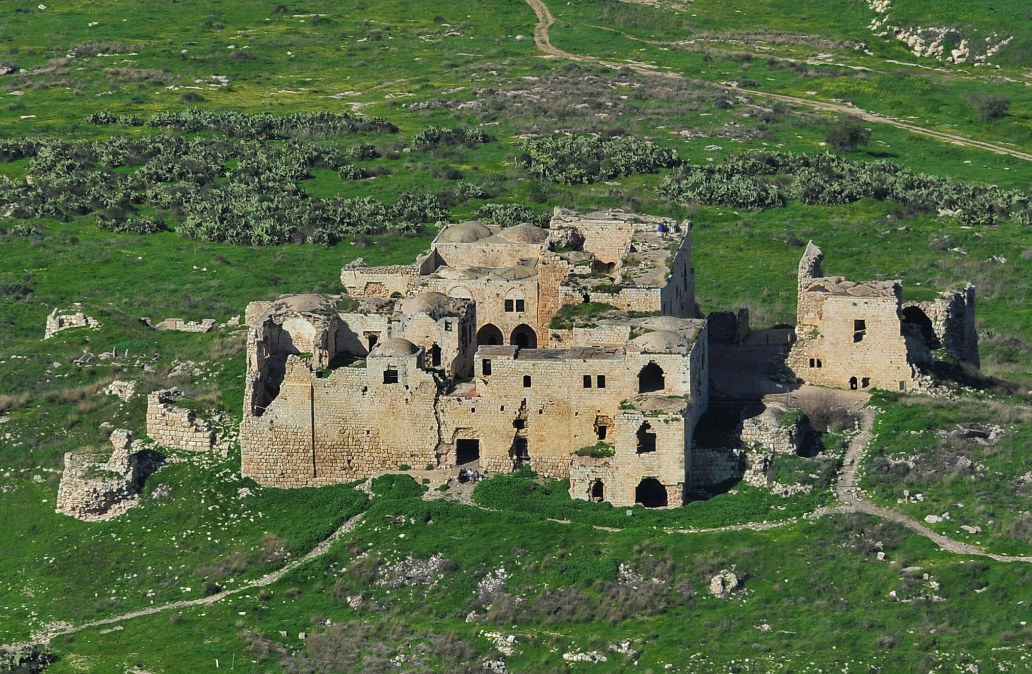 מגדל אפק (נקרא גם מגדל צדק) הוא שרידי יישוב קדום ומצודה על שם העיר אפק המזוהה עם תל אפק (אנטיפטריס) הסמוך. מגדל אפק נמצא מוקף על ידי שרידי הכפר הערבי מג'דל יאבא ששכן במקום עד מלחמת העצמאות.